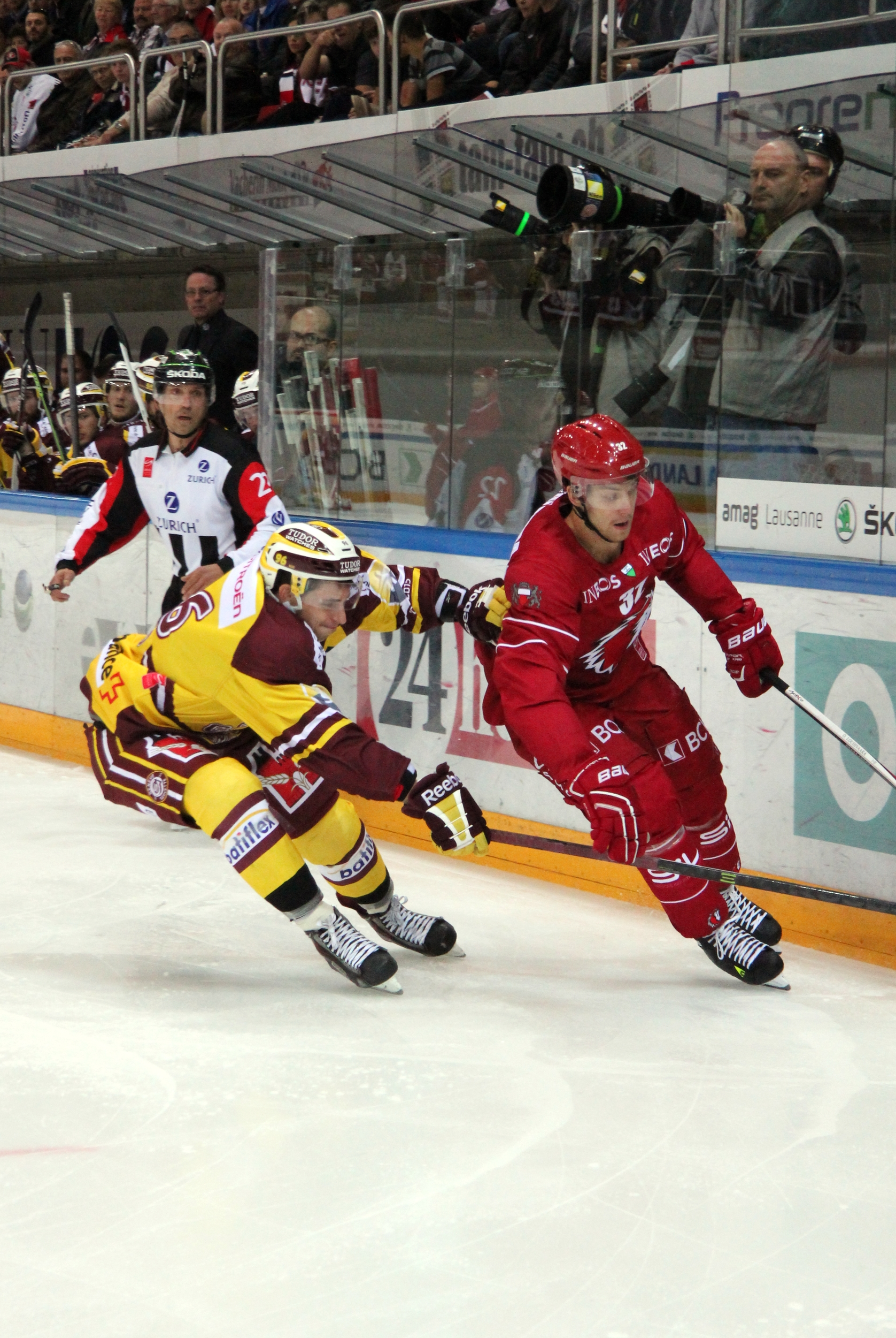 Noah Rod (G 96), Ossi Louhivaara (L 32).